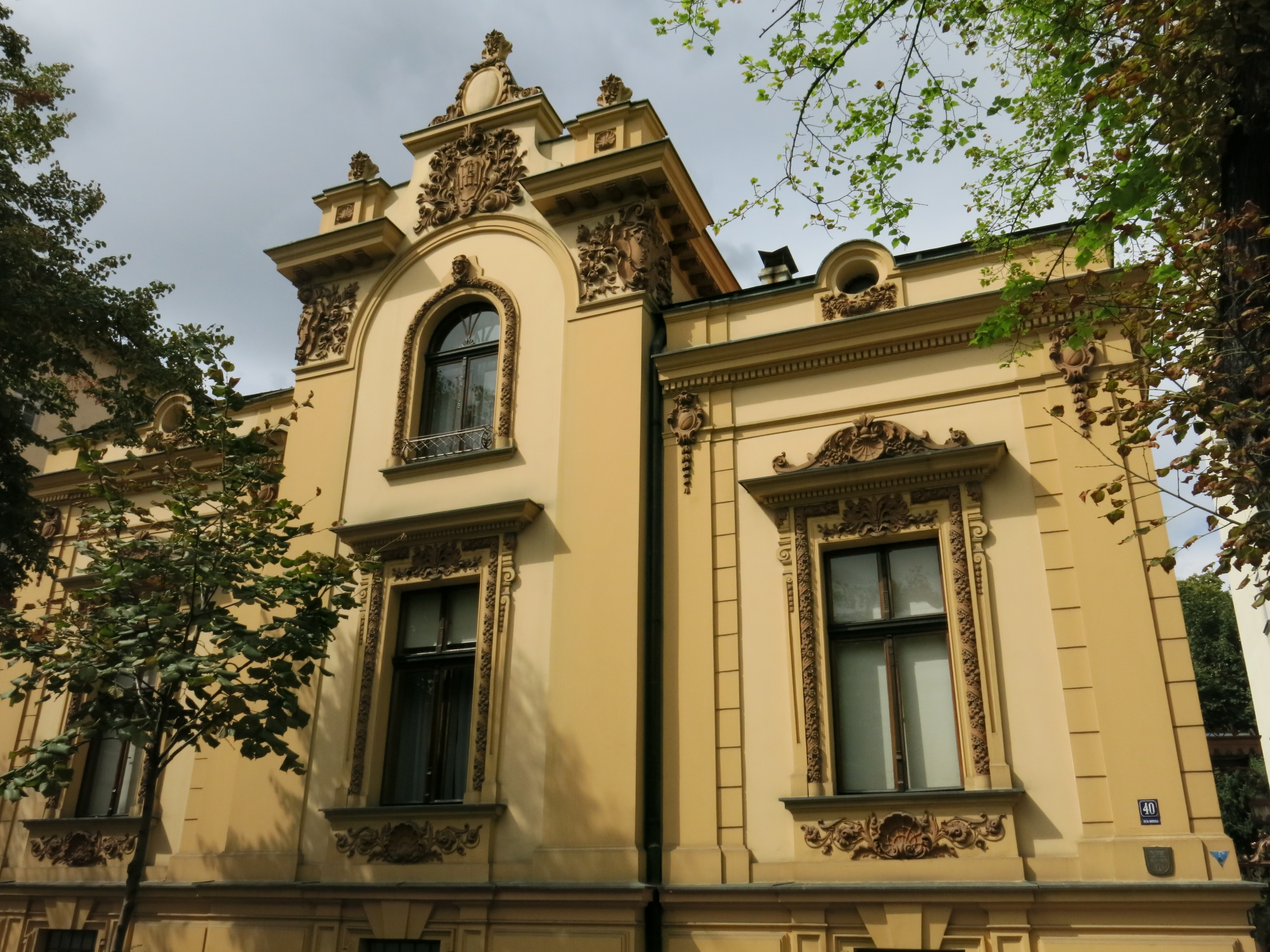 Породична кућа Николе Несторовића